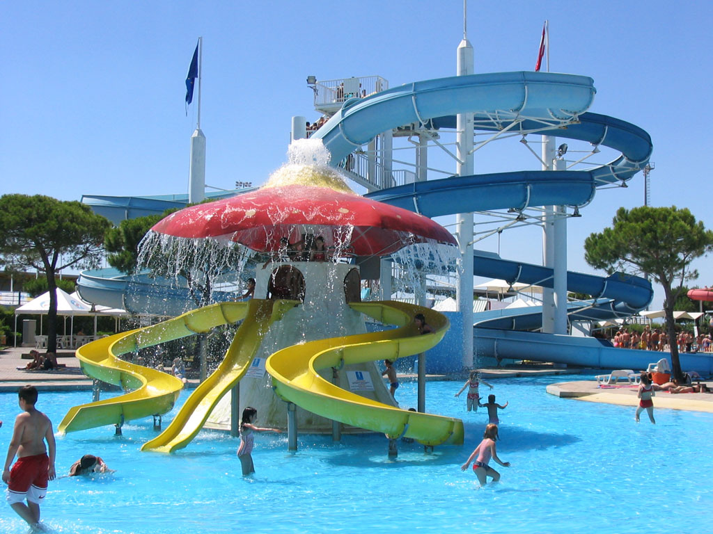 Super fungo & Anaconda